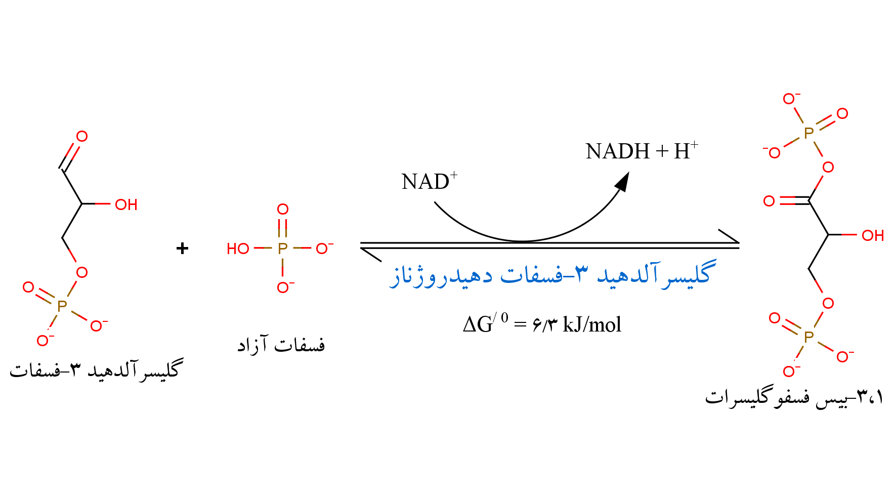 واکنش آنزیم گلیسرآلدهید ۳-فسفات دهیدروژناز و تبدیل گلیسرآلدهید ۳-فسفات به ۳،۱-بیس‌فسفوگلیسرات